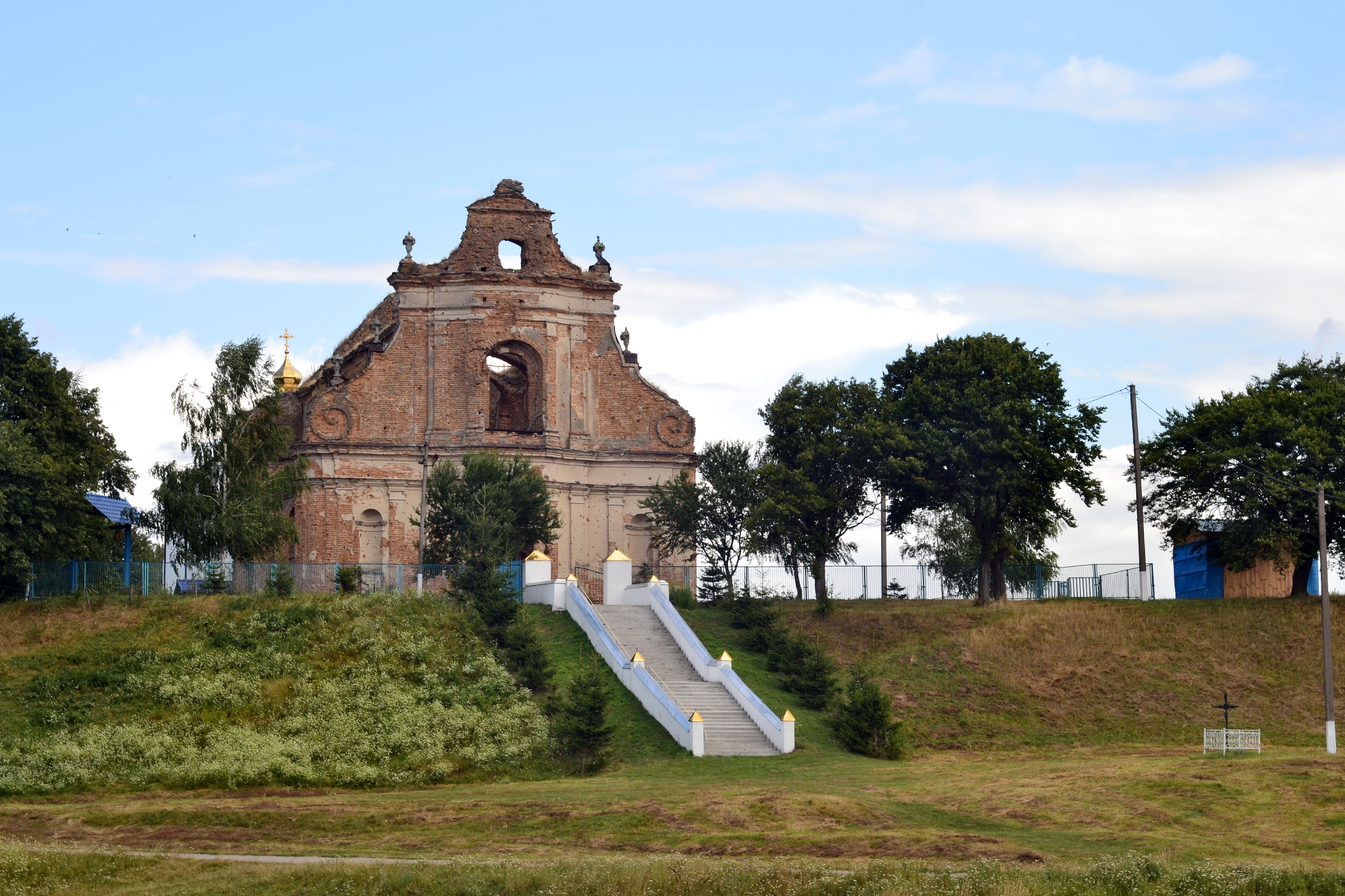 Загорівський монастир (1566 рік) - вигляд із заходу - Новий Загорів (на південній околиці села) Локачинський район Волинська область Україна